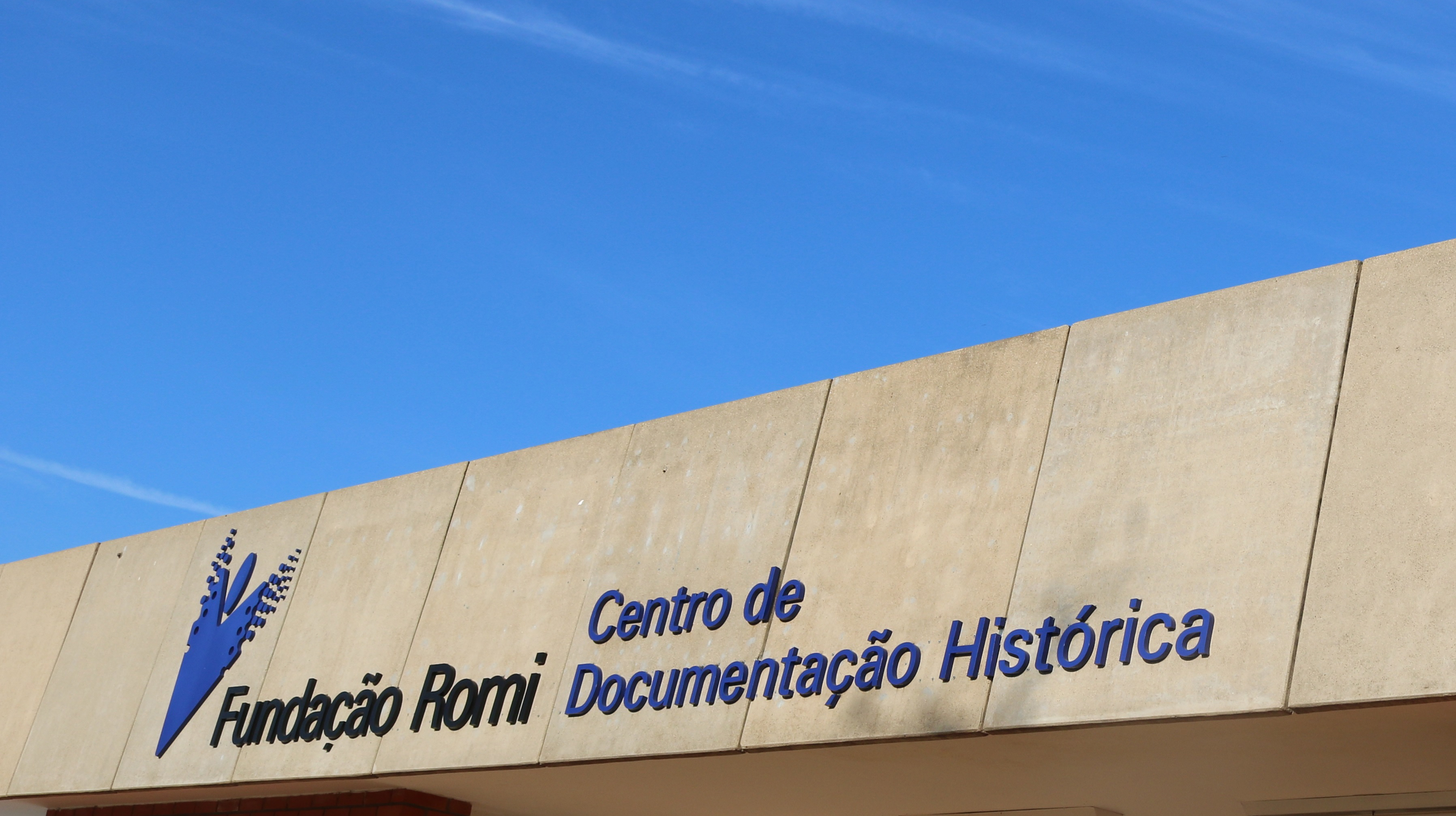 Fachada CEDOC 2019